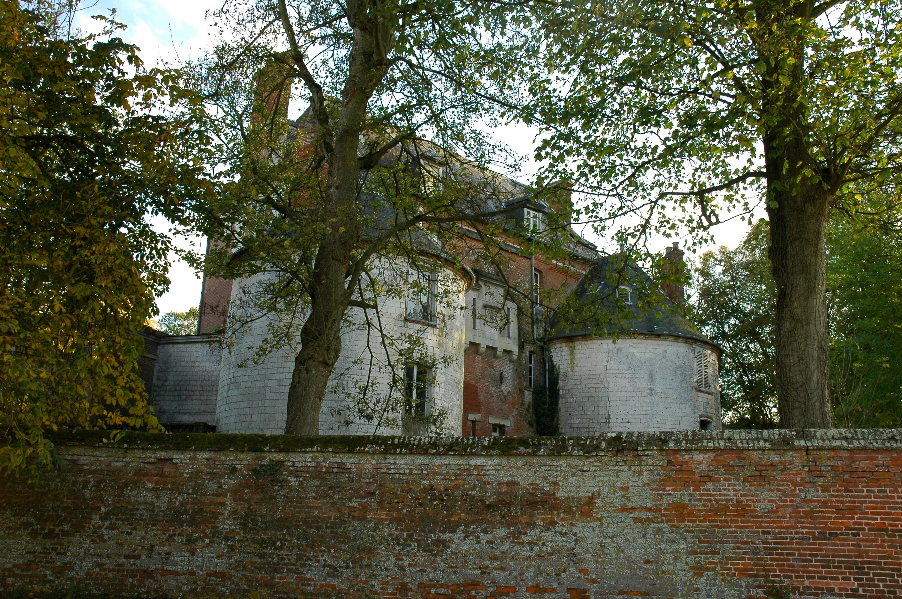 Bouillancourt-en-Séry (Somme, France). Le château.